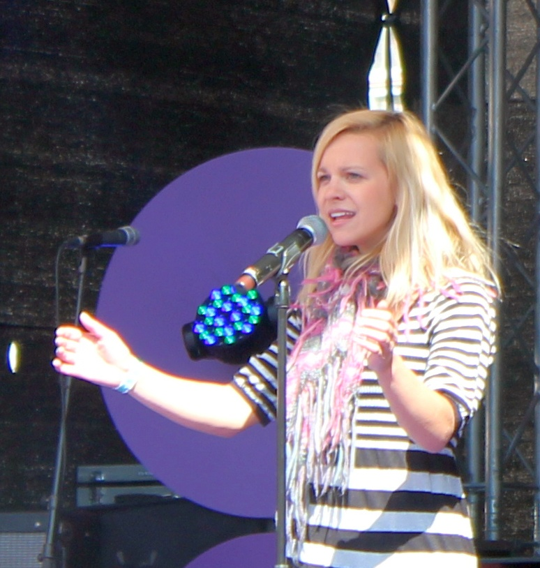 Marilyn Jurman esinemas ansambliga Mantra Gora emadepäeva kontserdil Tallinnas Raekoja platsil (13. mai 2012).